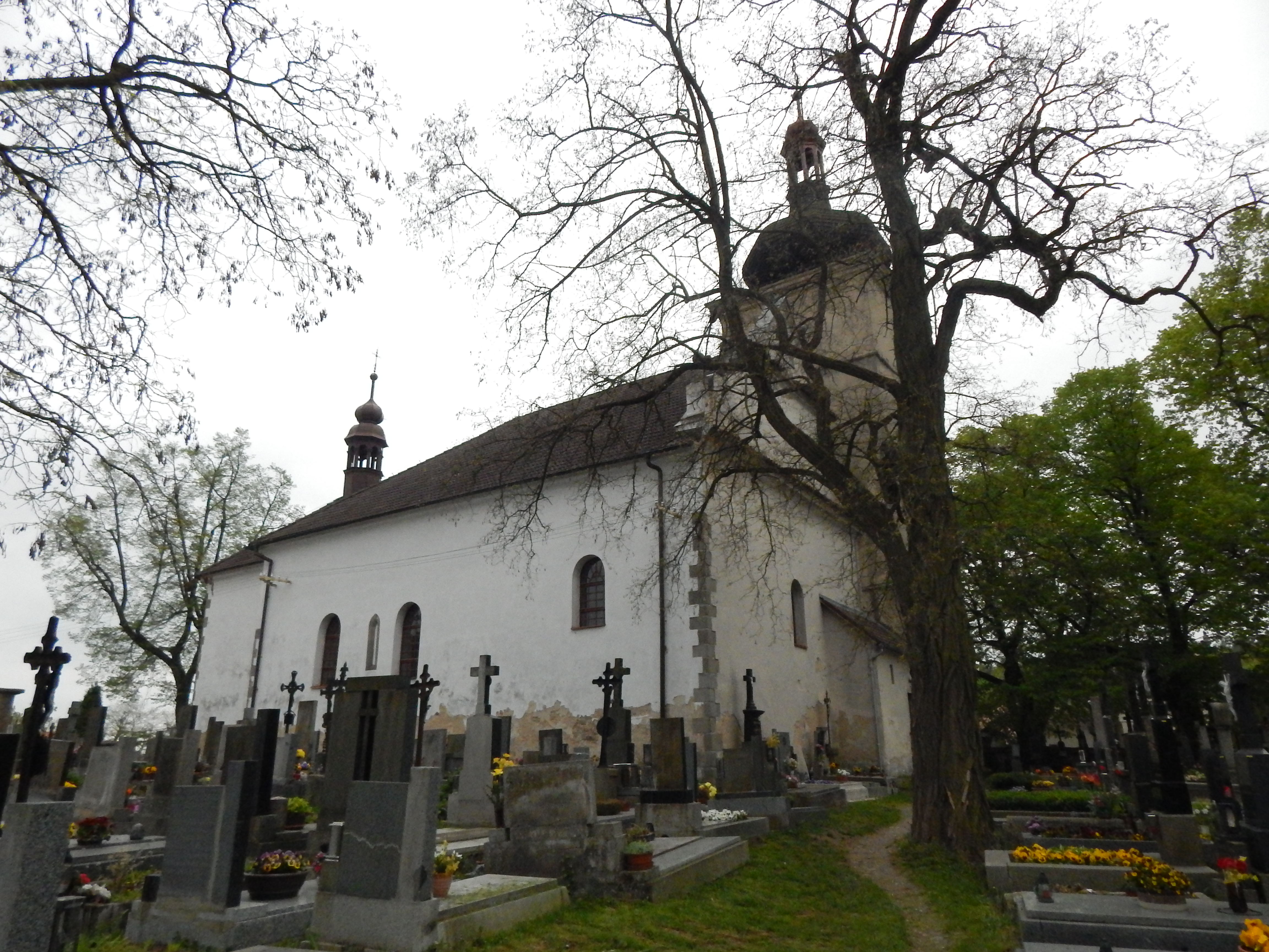 Milín-Slivice; kostel sv. Petra; Pohled severozápadní